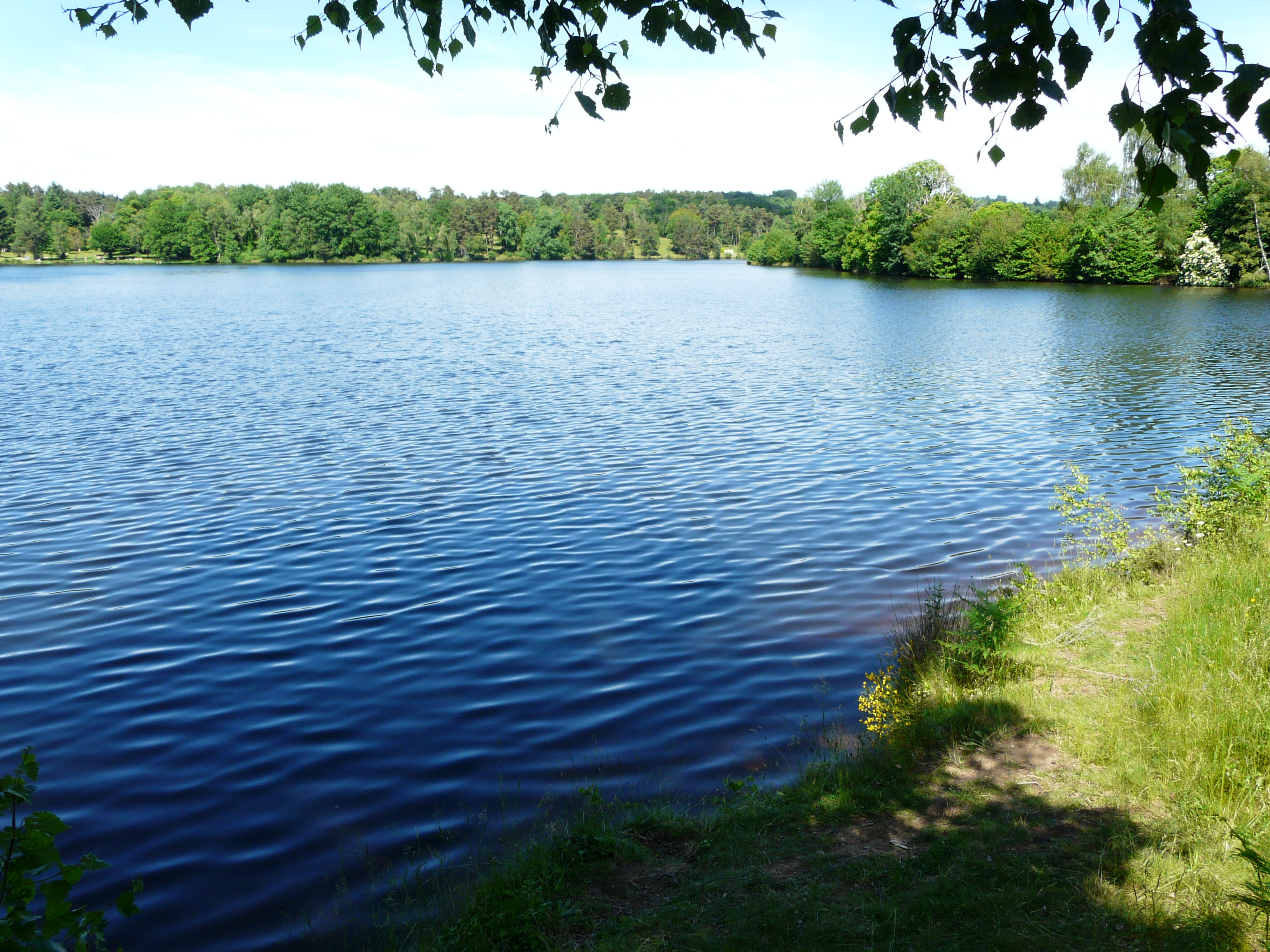 Le lac du Coiroux, Aubazine, Corrèze, France